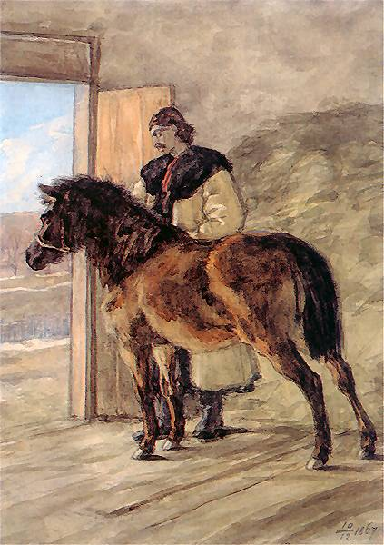 Генрик Родаковський.Конюшний Іван.: Генрик Родаковський.Конюшний Іван.